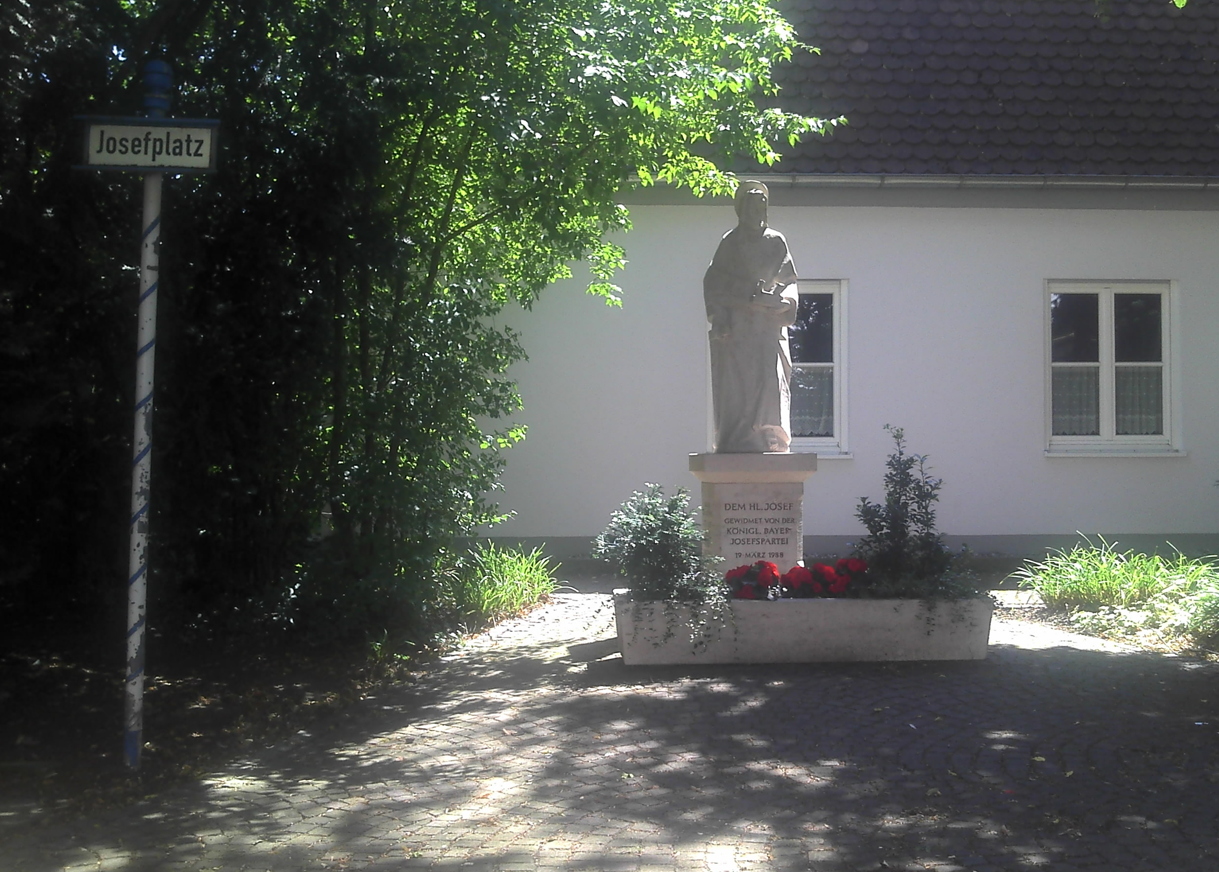 "Josefplatz" in Aichach mit einer Statue des heiligen Josefs, von Christian Angerbauer, gestiftet 1988 von der Königlich Bayerischen Josefspartei. Ecke Fußweg Knollenweg/Werlbergerstraße, rechter Hand vor dem Oberen Tor. Geokordinaten etwa 48.281365,11.044006.